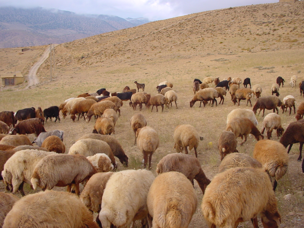 (1380( عکس: حمیدرضا بزرگ معلم شاهکوه دامپروری در شاهکوه گرگان